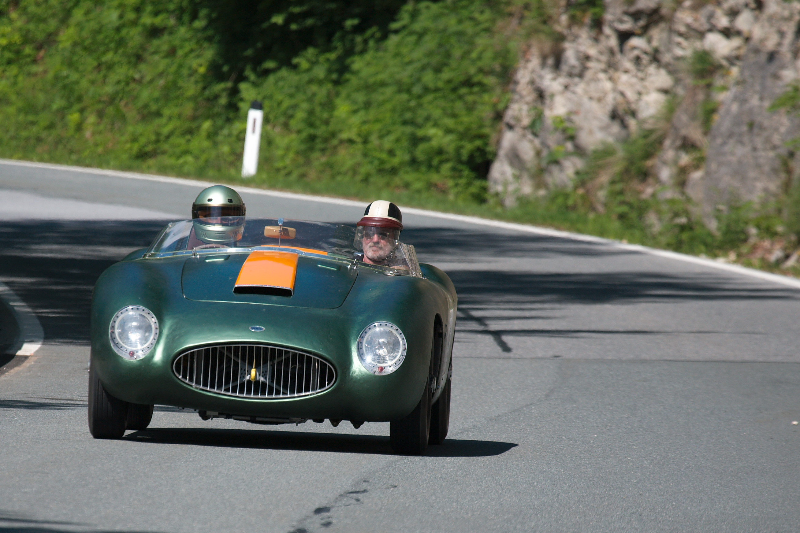 Emeryson 2 seater at Gaisbergrennen 2009